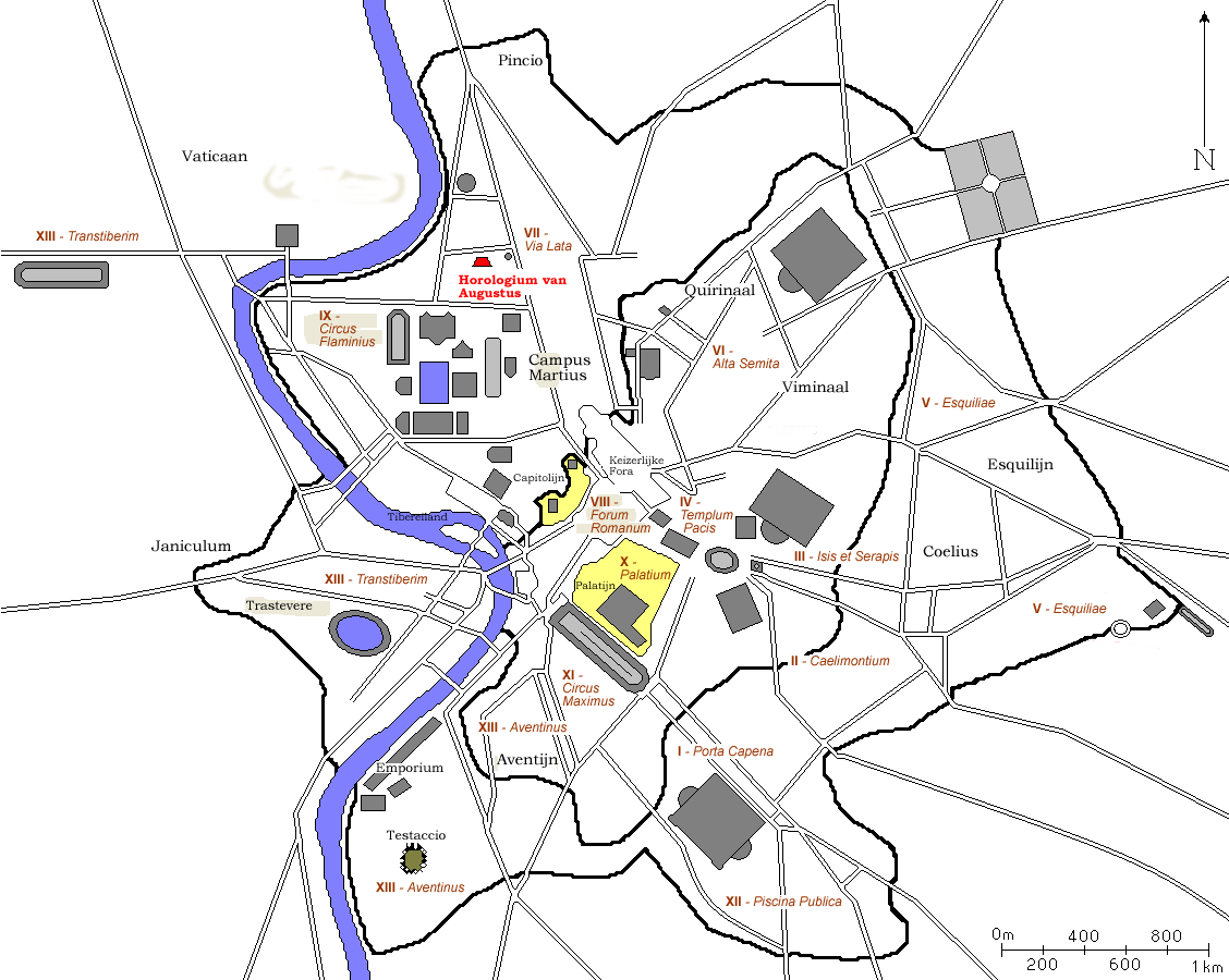 Kaart van antiek Rome waarop het Horologium van Augustus is uitgelicht. Kaart is afkomstig van FR:wiki en door mij naar een Nederlandse versie bewerkt. Auteurs: nl::fr:User:ColdEel en Gebruiker:Joris1919